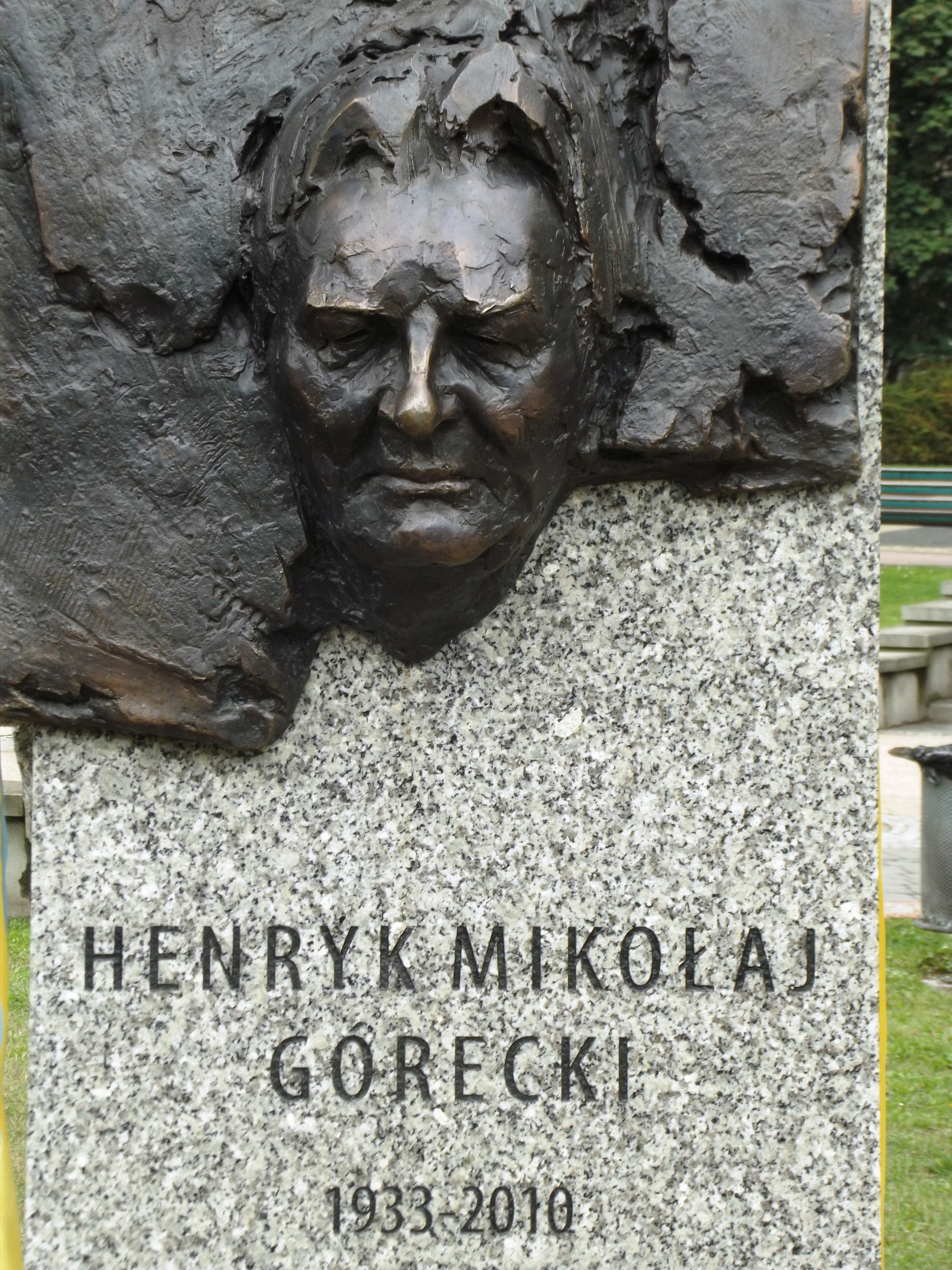 Popiersie Henryka Mikołaja Góreckiego w Galerii Artystów na placu Grunwaldzkim w Katowicach